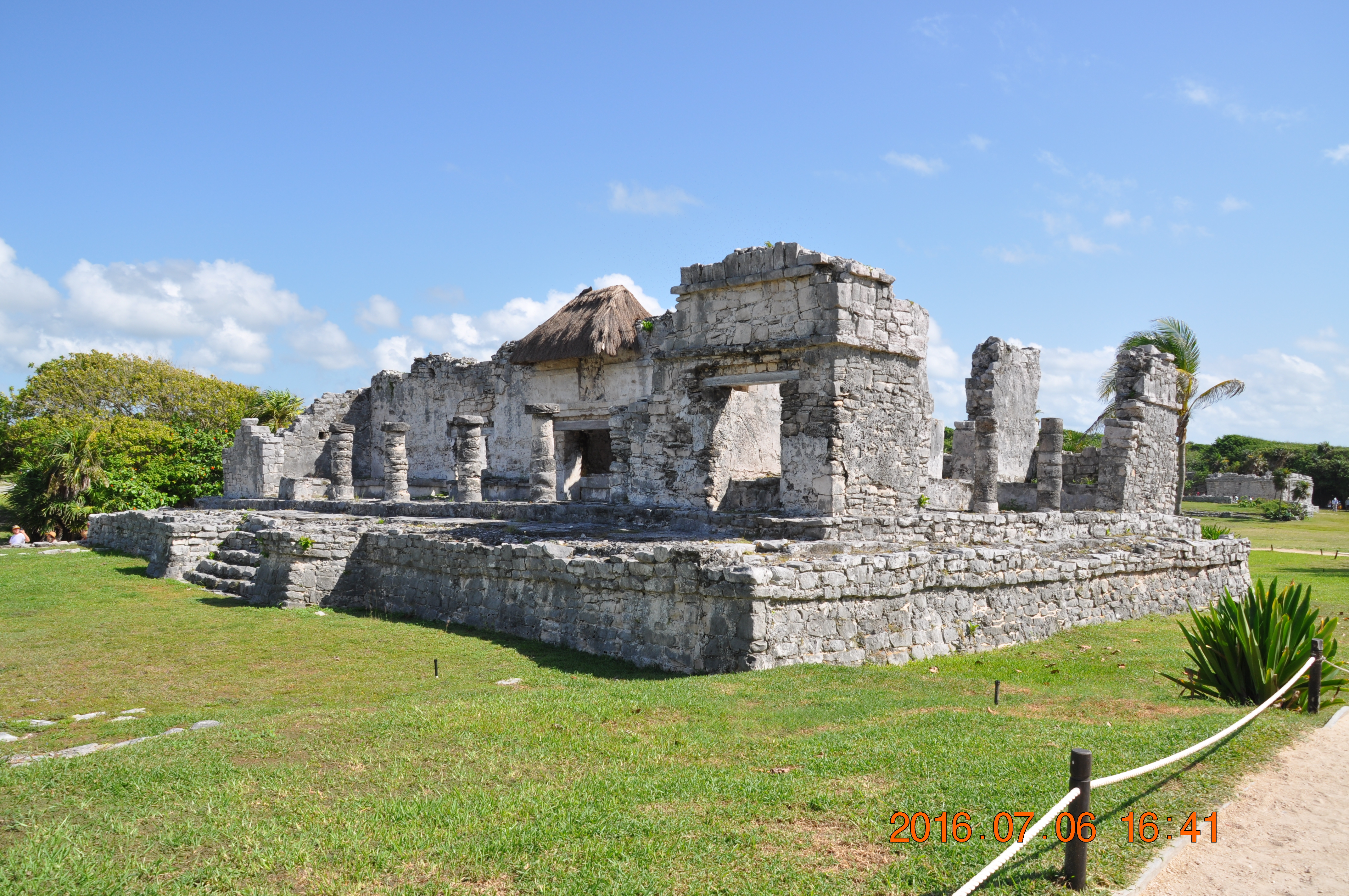 Une partie des ruines de Tulum